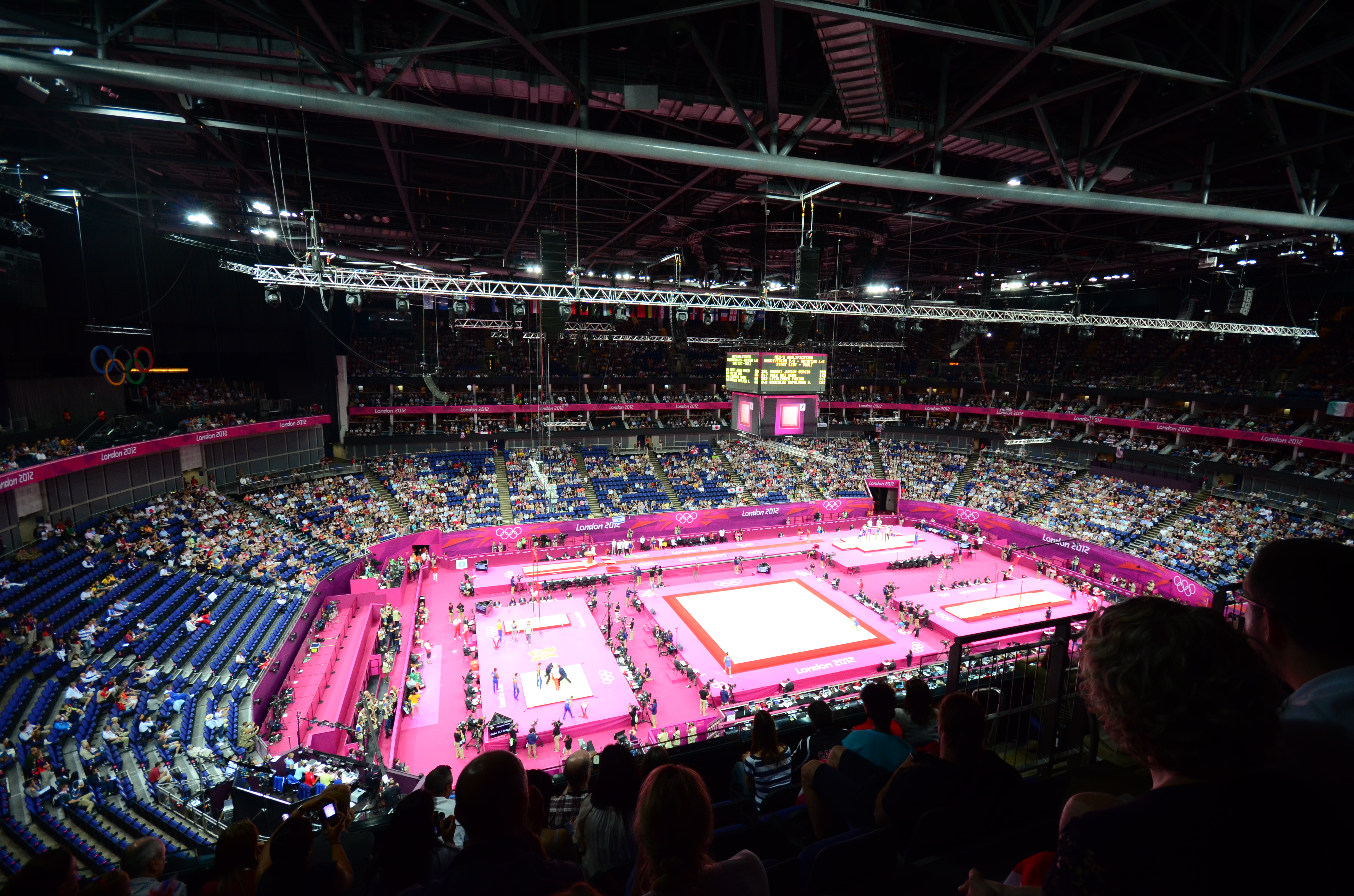 Gymnastique artistique aux JO de Londres 2012.